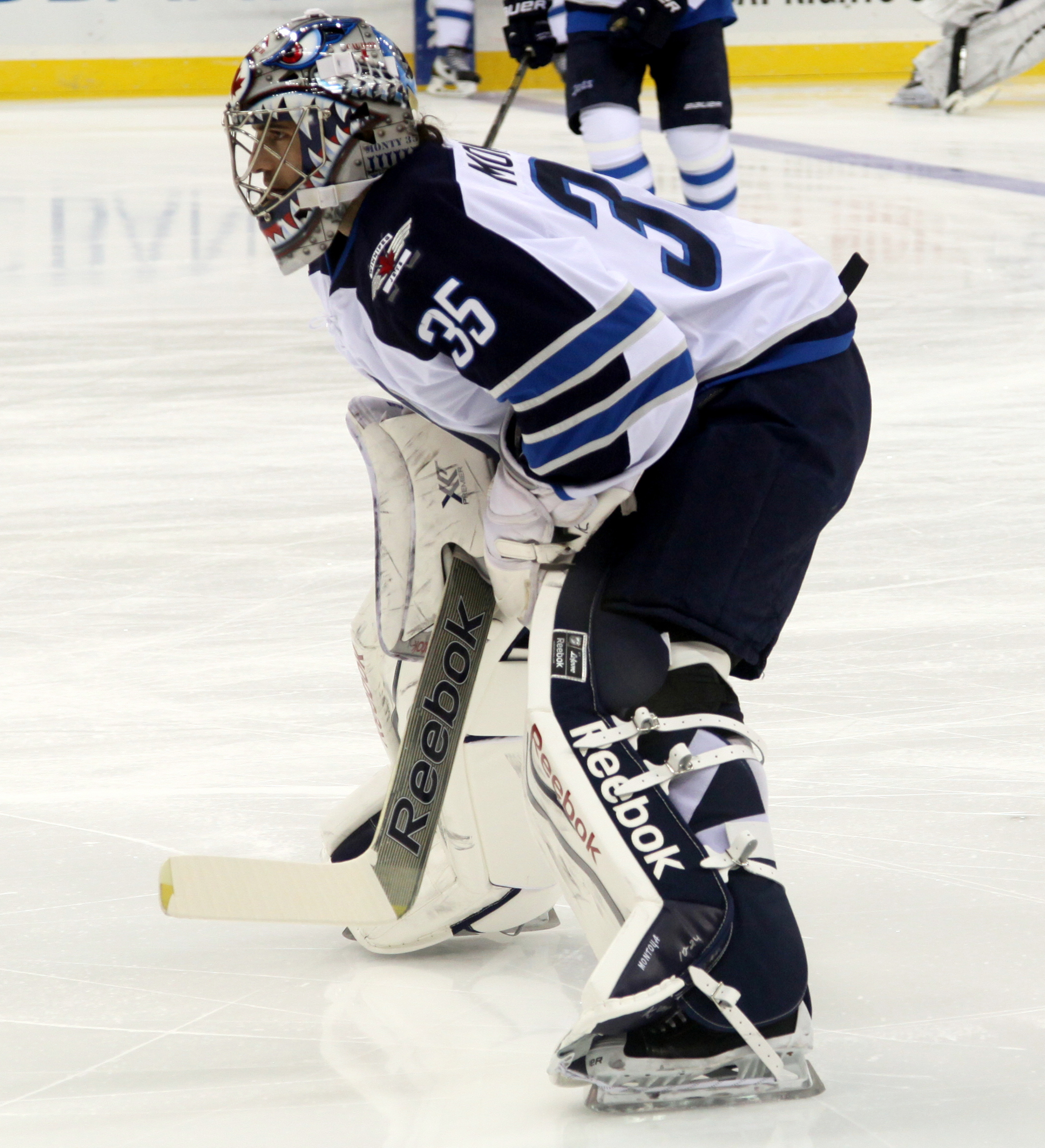 Montoya in 2013.